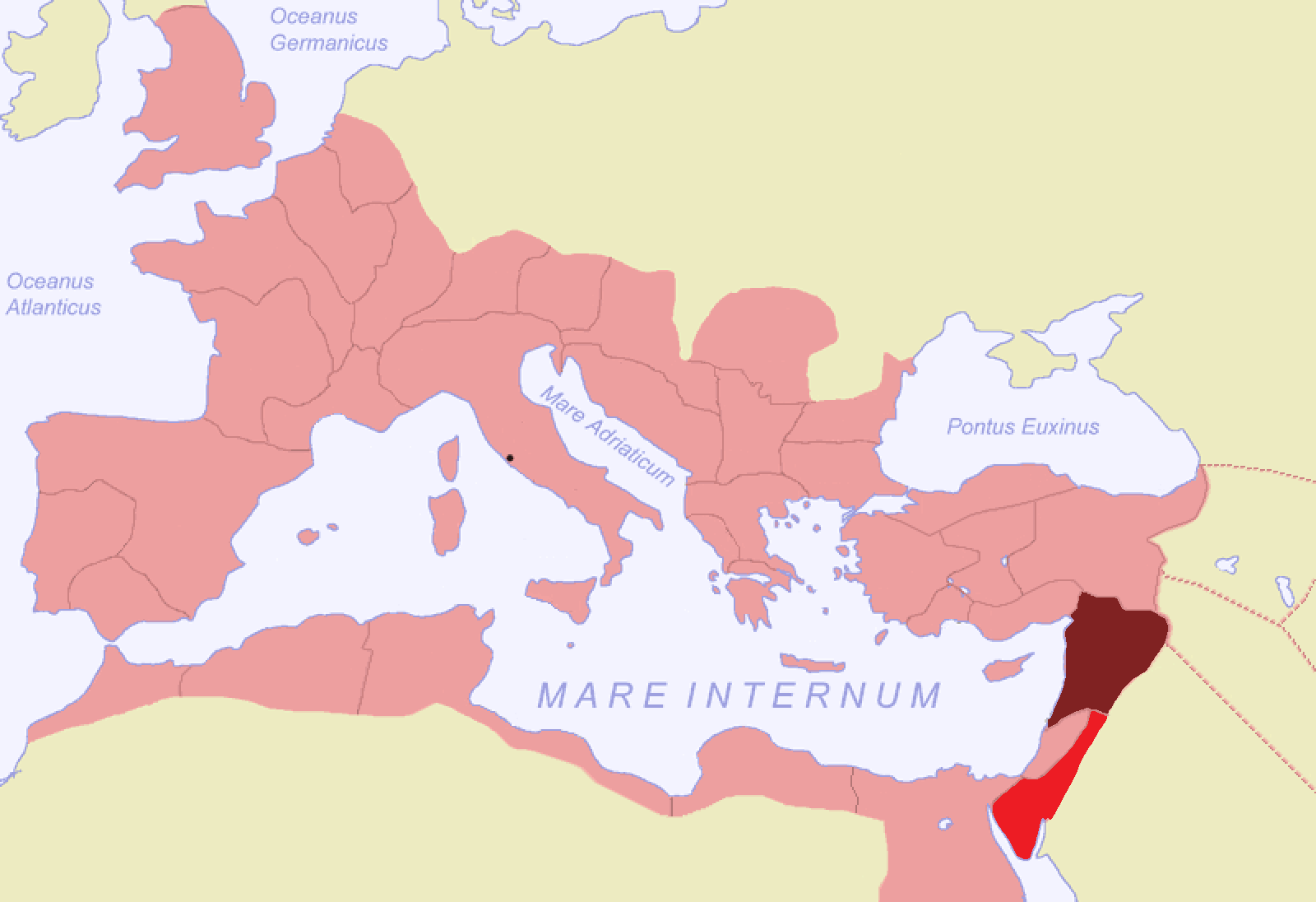 Carte de l'Empire romain en 116 avec l'Arabie et la Syrie surlignées